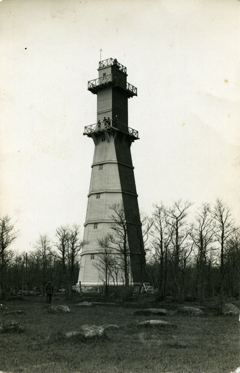 Abruka ülemine puidust tuletorn